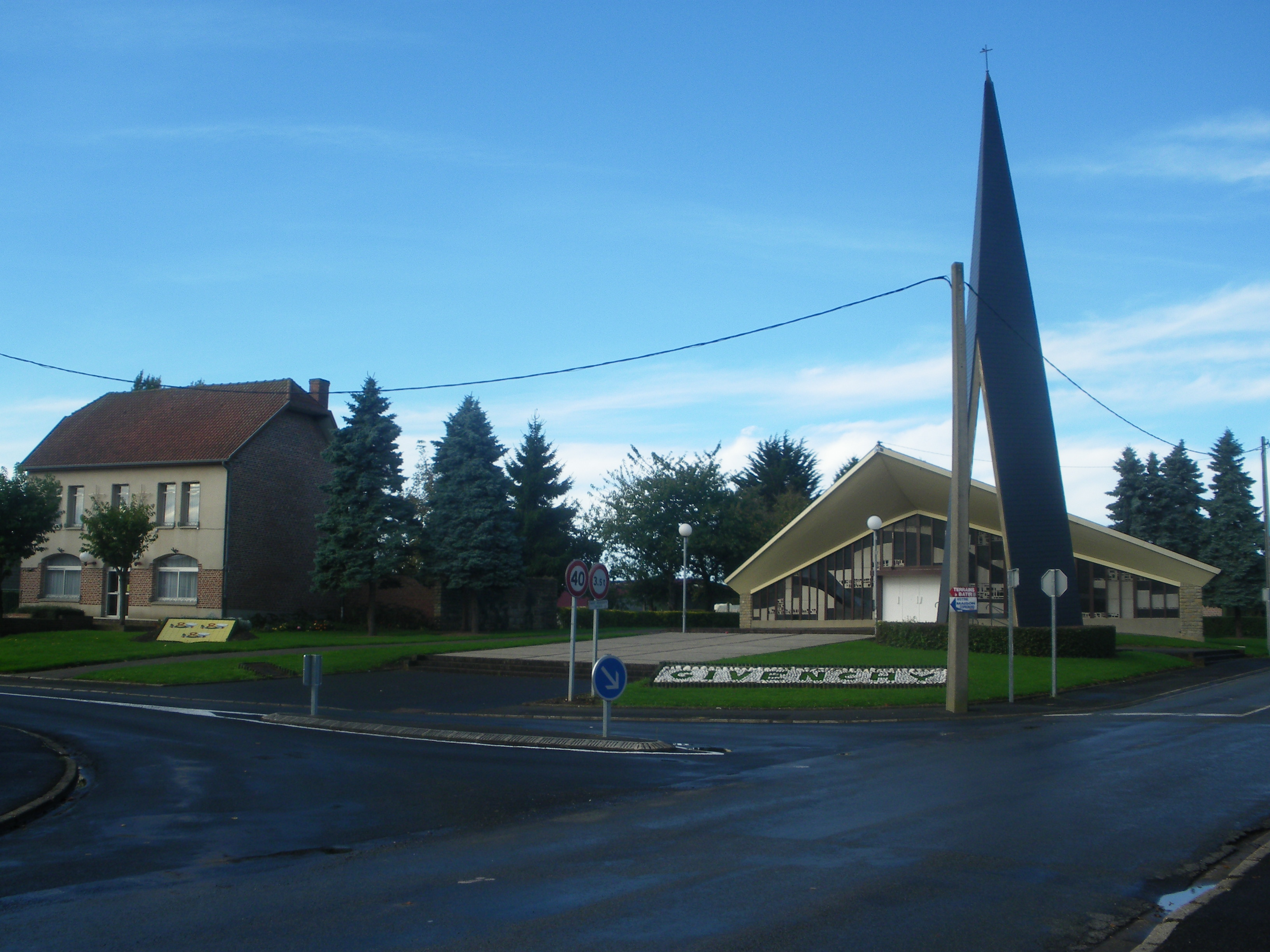 Centre de Givenchy-lès-la-Bassée : à gauche la mairie, à droite l'église Saint-Martin.